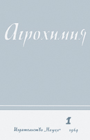 Обложка первого номера журнала "Агрохимия" 1964 год